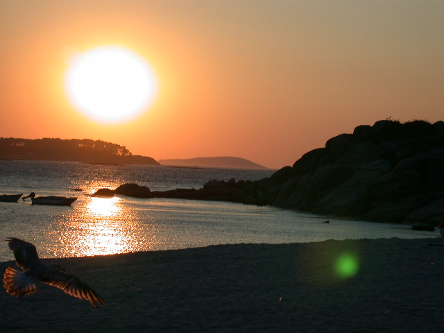 Praia de Menduiña con Punta Couso e Illas Ons ao fondo